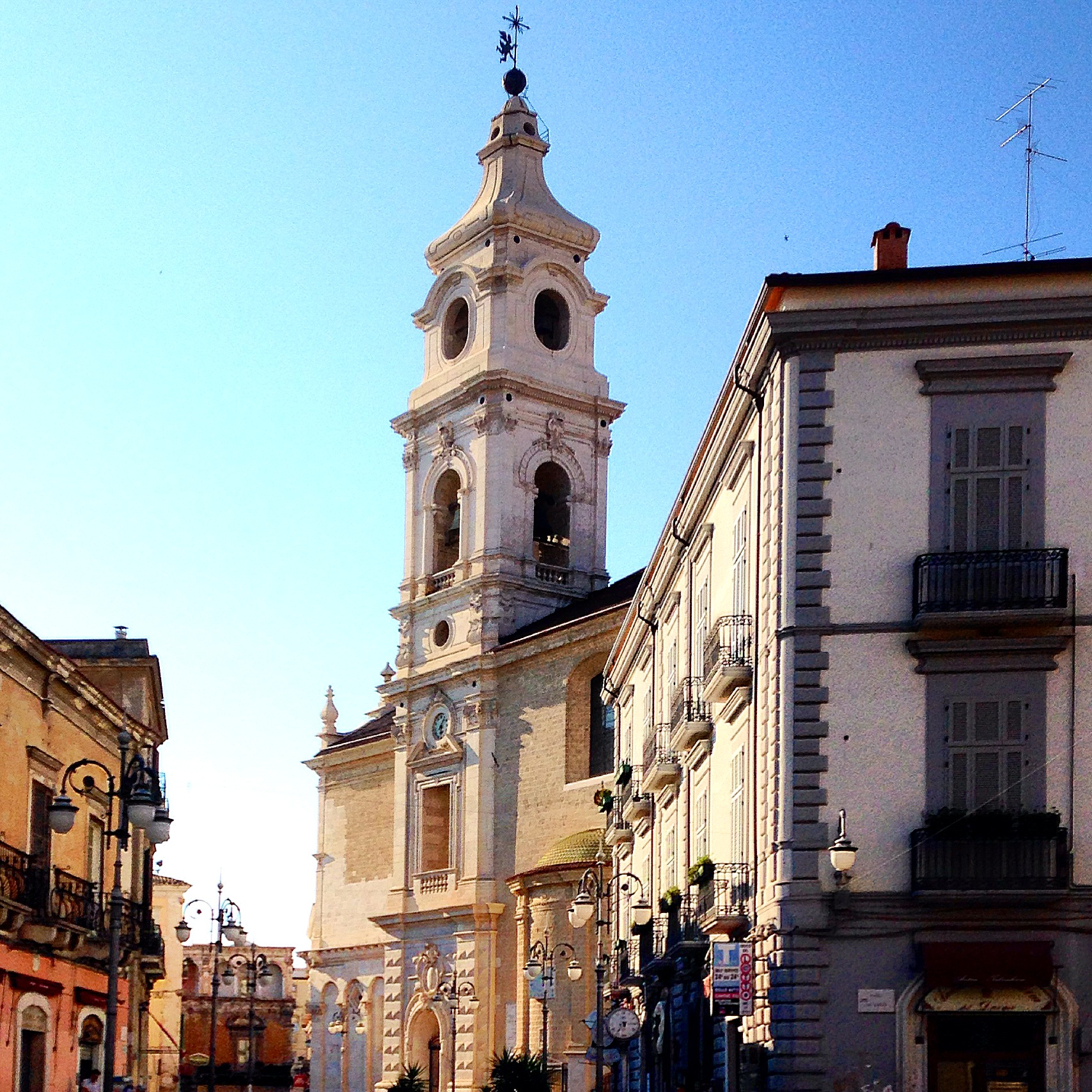 Cattedrale